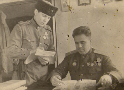 Это фотография умершего человека: Сергея Фёдоровича Горохова. Фотография сделана не позже апреля 1945 года, когда его наградили вторым орденом Кутузова.